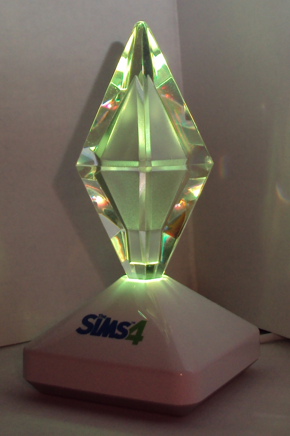 USB-plumbob van De Sims 4 geeft geelgroen licht